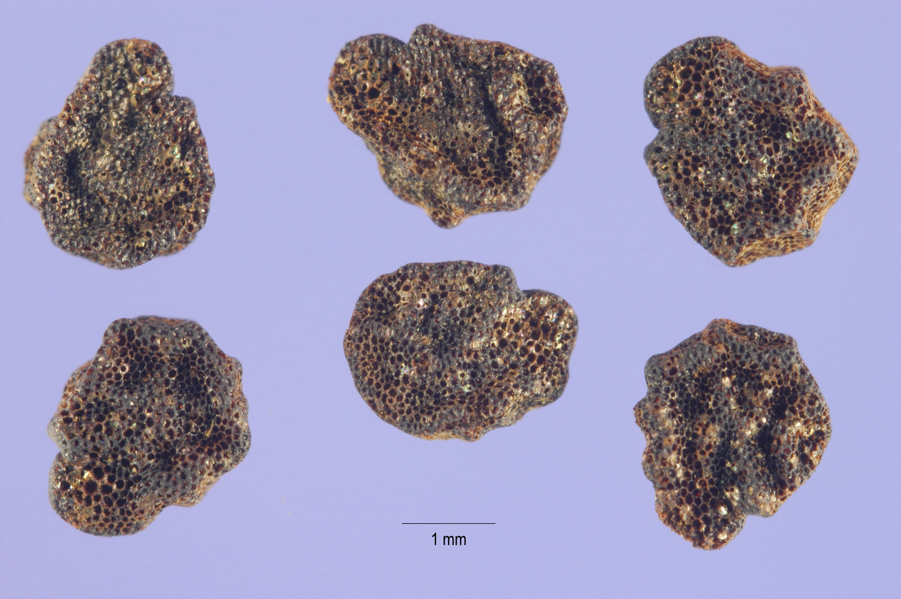 Solanum rostratum, seeds